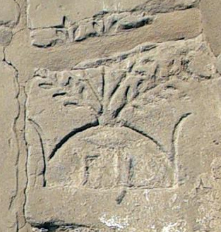 Tombeau d'Osiris sous une Butte de terre plantée d'un arbre sacré.